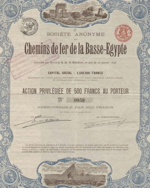 Chemins de fer de la Basse Egypte, Action privilégiée de 500F - Le Caire 1896